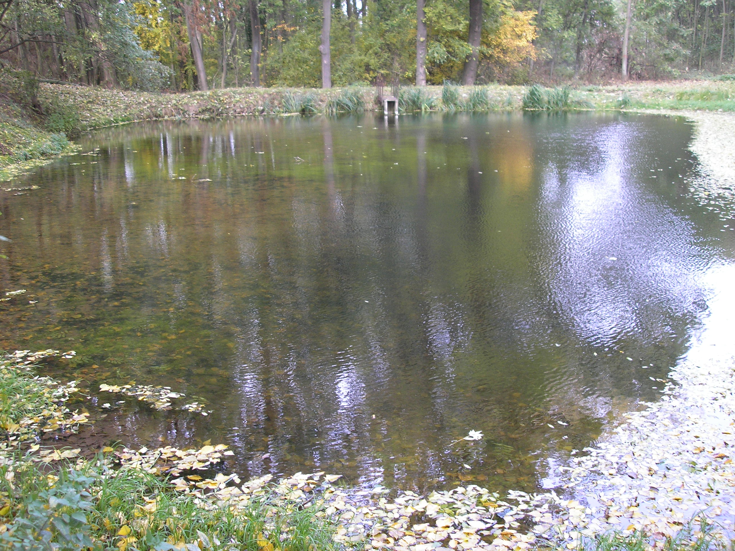 Pohled od jihu na rybník a hráz